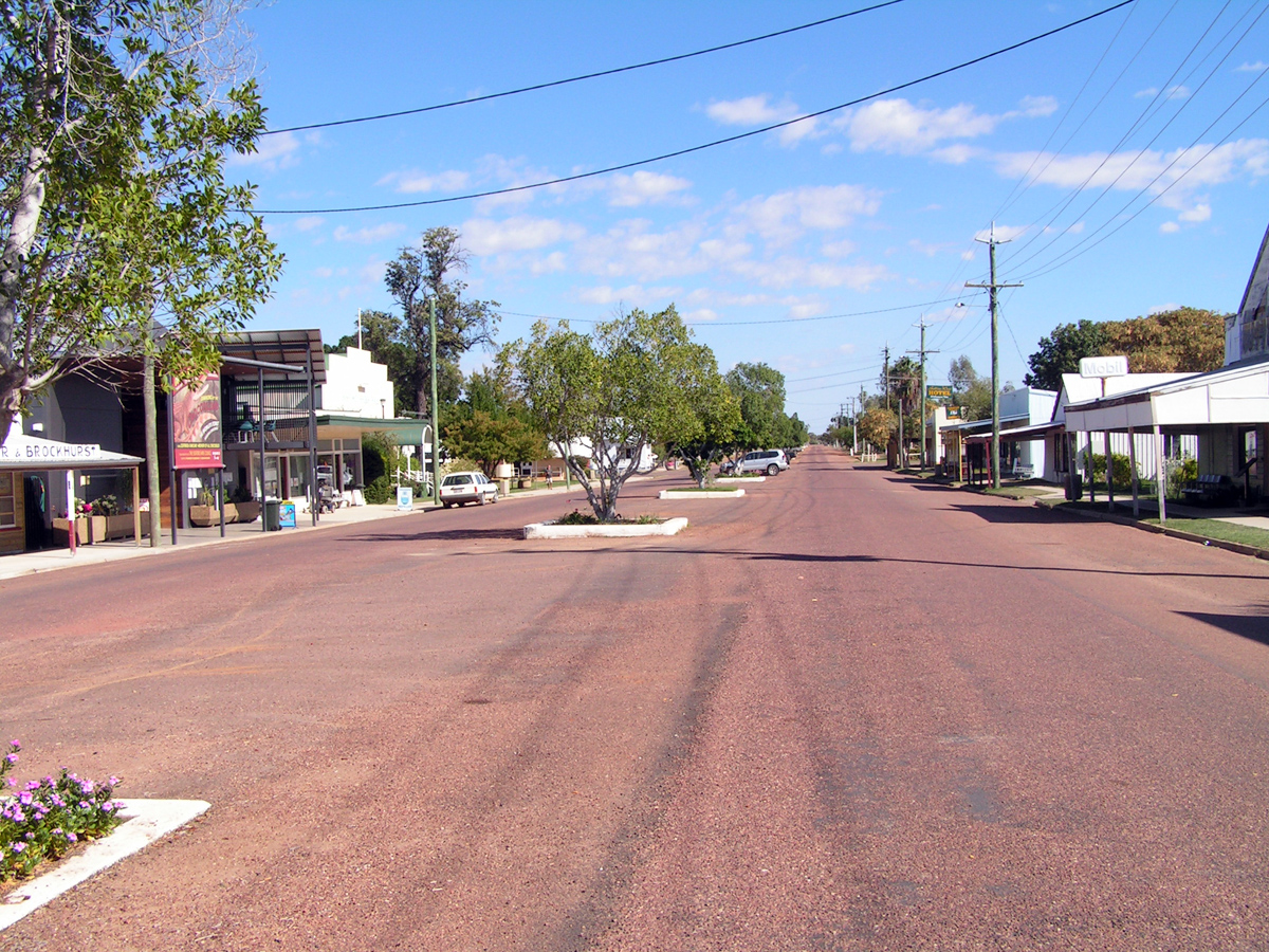 Isisford